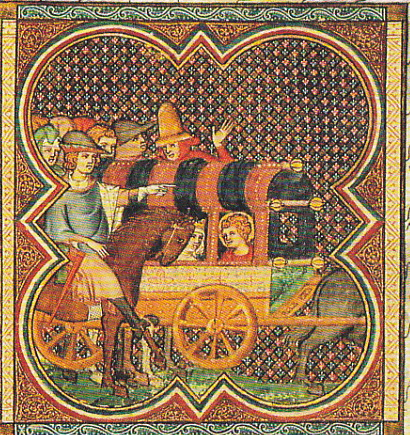 Ludwig IX. (Saint Louis) mit seiner Mutter Blanka von Kastilien unterwegs zur Königsweihe in Reims. Der junge Ludwig wird ohne Krone aber schon mit Heiligenschein dargestellt. Miniatur aus dem Stundenbuch der Königin Johanna II. von Navarra, 1334. Paris, Bibliothèque nationale de France, Fr. 5716, fol. 48 v°